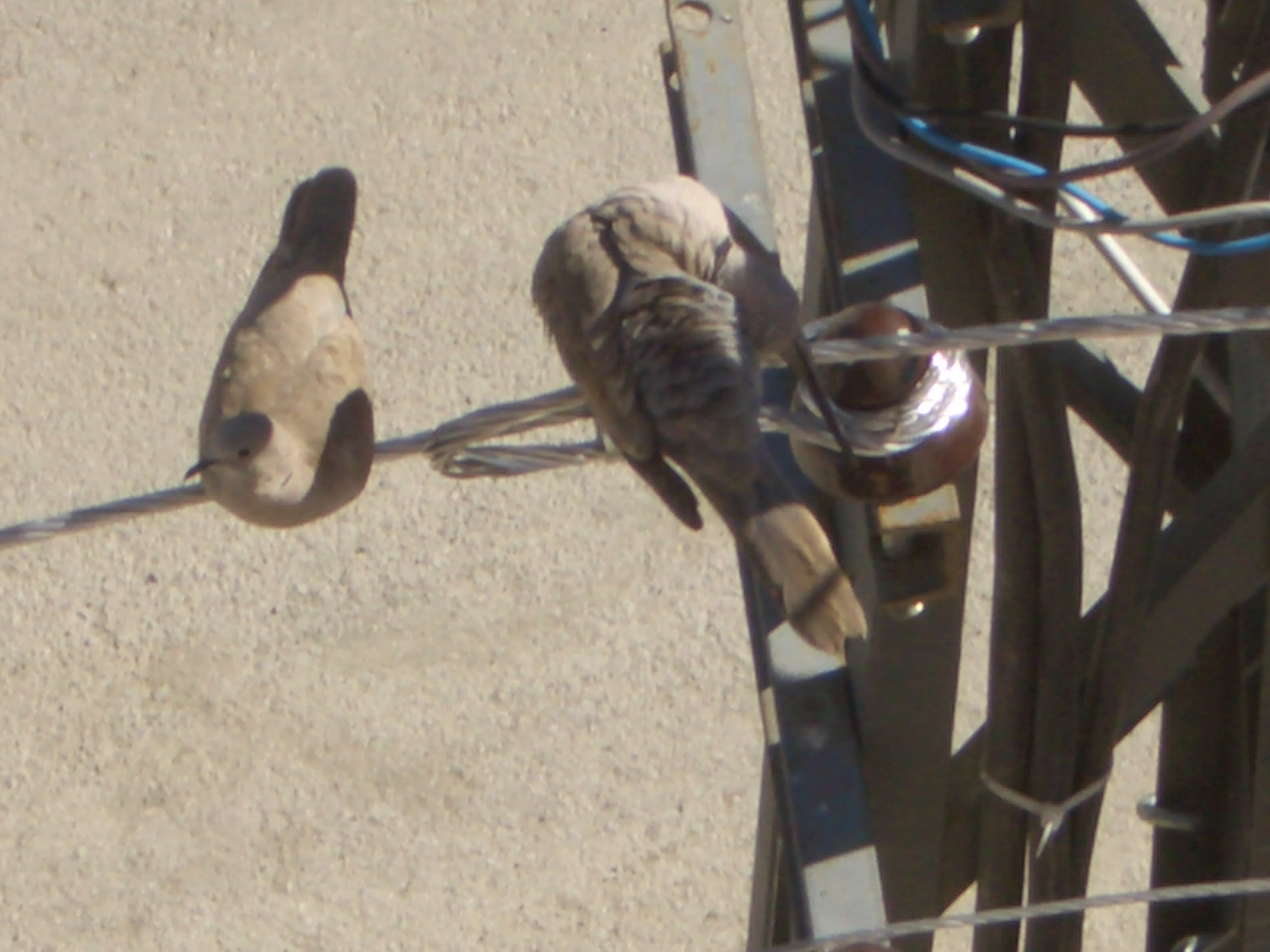 Çifte kumrular